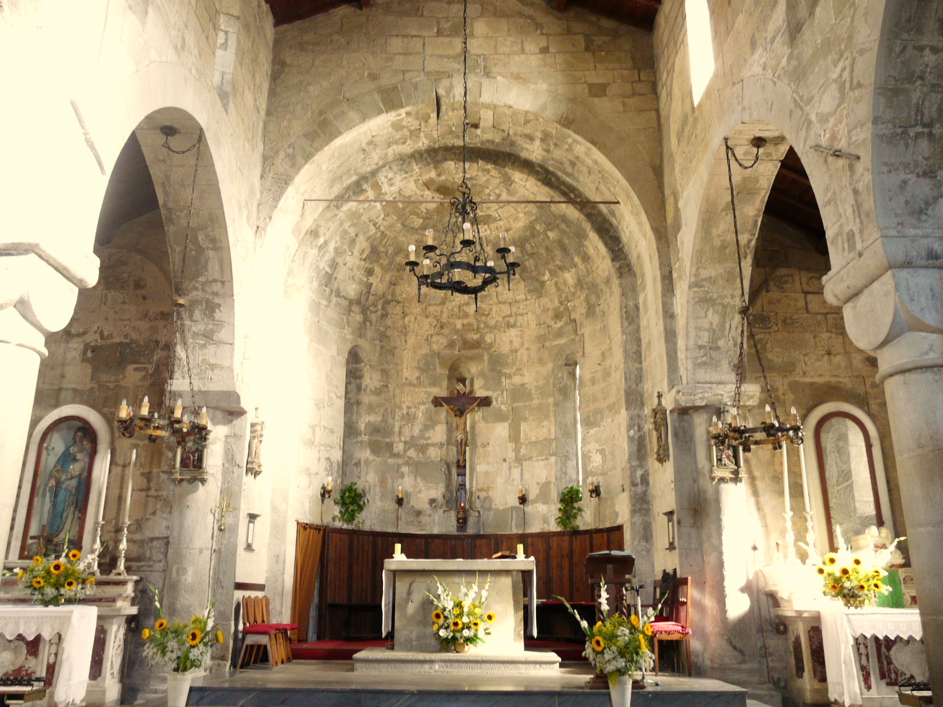 Chiesa di San Lorenzo di Pieve San Lorenzo, Minucciano, Toscana, Italia